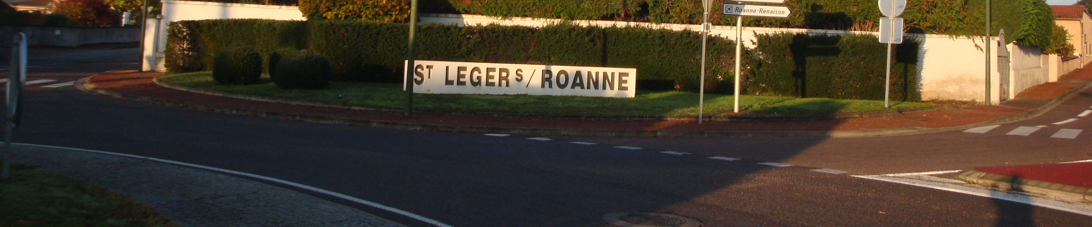 Rond points de Saint Léger sur Roanne